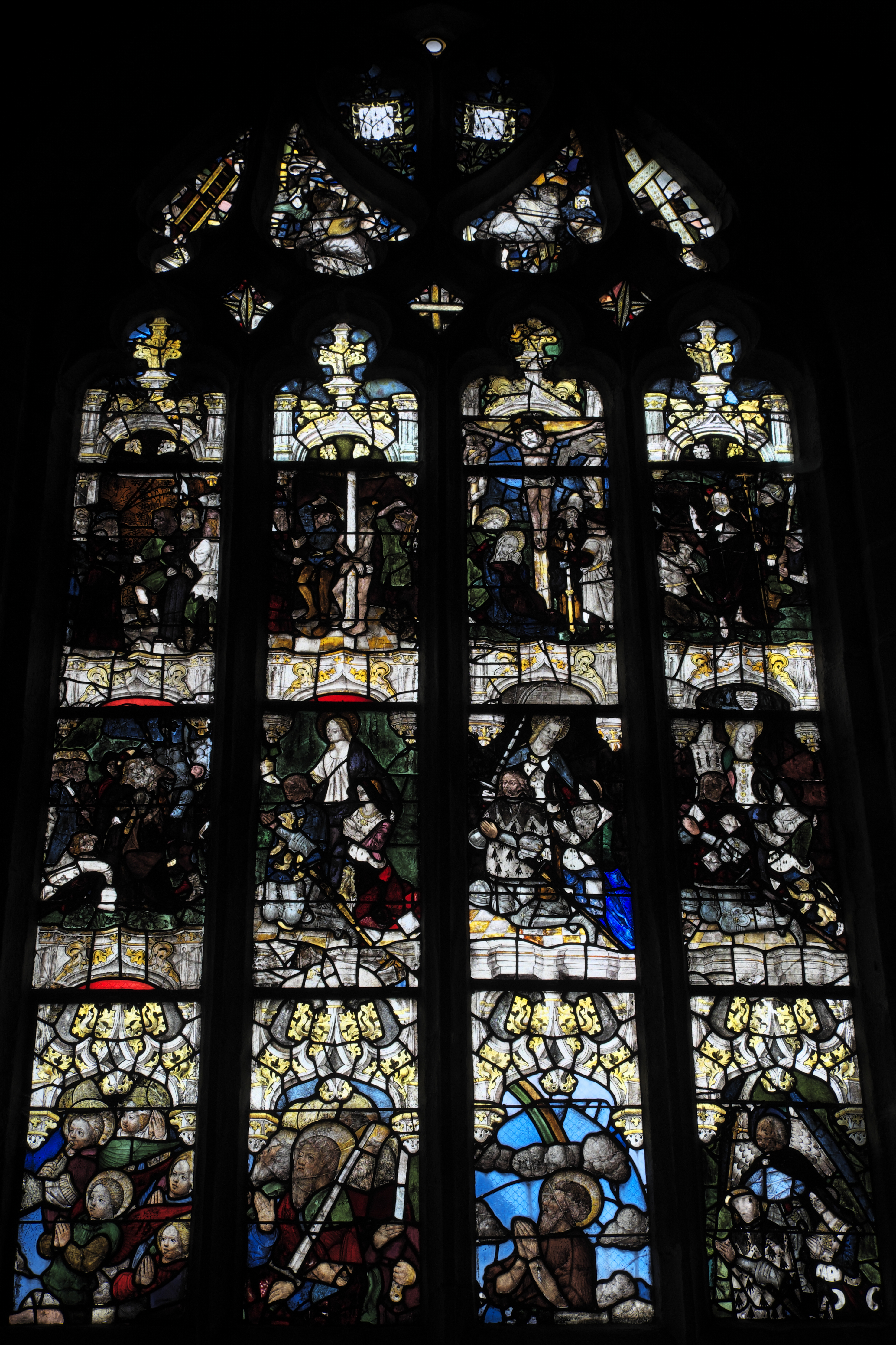 Katholische Kirche Saint-Fiacre in Guengat im Département Finistère (Region Bretagne/Frankreich), Bleiglasfenster (baie 4) um 1500 und um 1525; Darstellung: Szenen der Passion und Auferstehung Christi, Jüngstes Gericht (Fragmente); Stifter mit Schutzpatronen